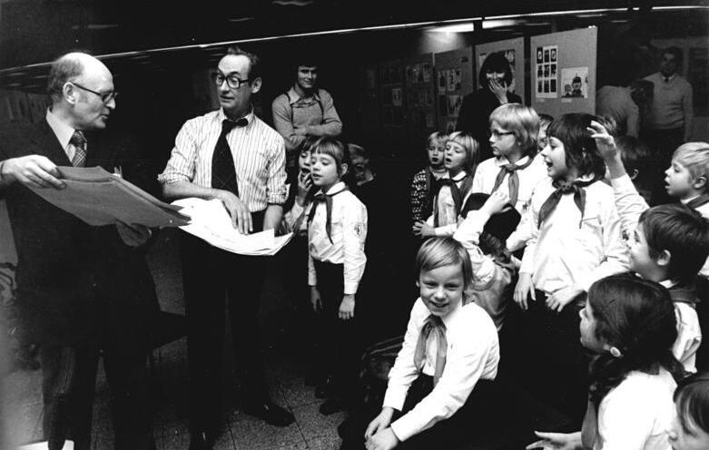 ADN-ZB-Settnik-10.12.1975-bi-Berlin: Pioniernachmittag in der Ausstellung. Einen erlebnisreichen Pioniernachmittag hatten die Schüler der Klasse 2a aus der 5. Oberschule des Stadtbezirkes Mitte am 10. Dez. 1975 in der Ausstellung "Für Kinder gemalt" am Fernsehturm. Der Kinderbuchautor Fred Rodrian (l) las einige kurze Erzählungen und Prof. Werner Klemke fertigte dazu nach Anregungen der Kinder Illustrationen.